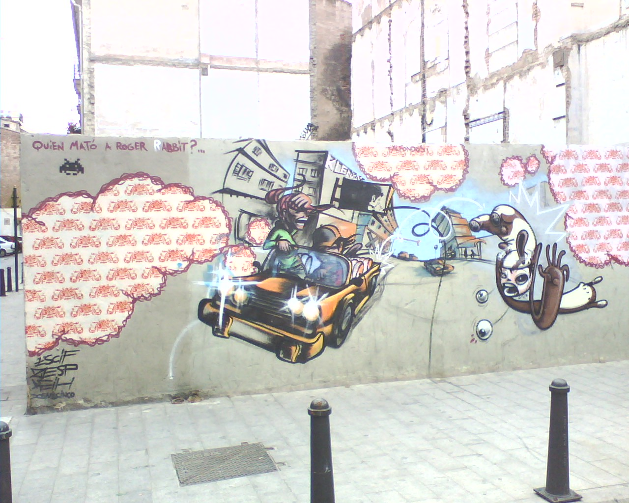 Un grafitti en el Barrio del Carmen, Valencia